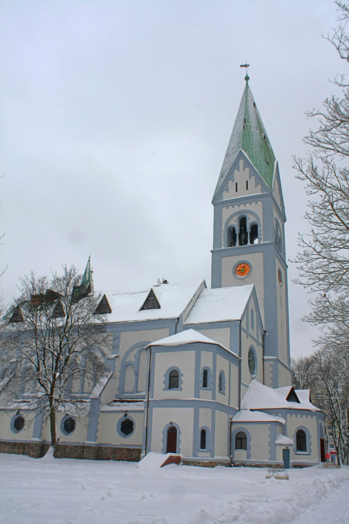 Калининград, бывшая Кирха памяти королевы Луизы, ныне - театр кукол